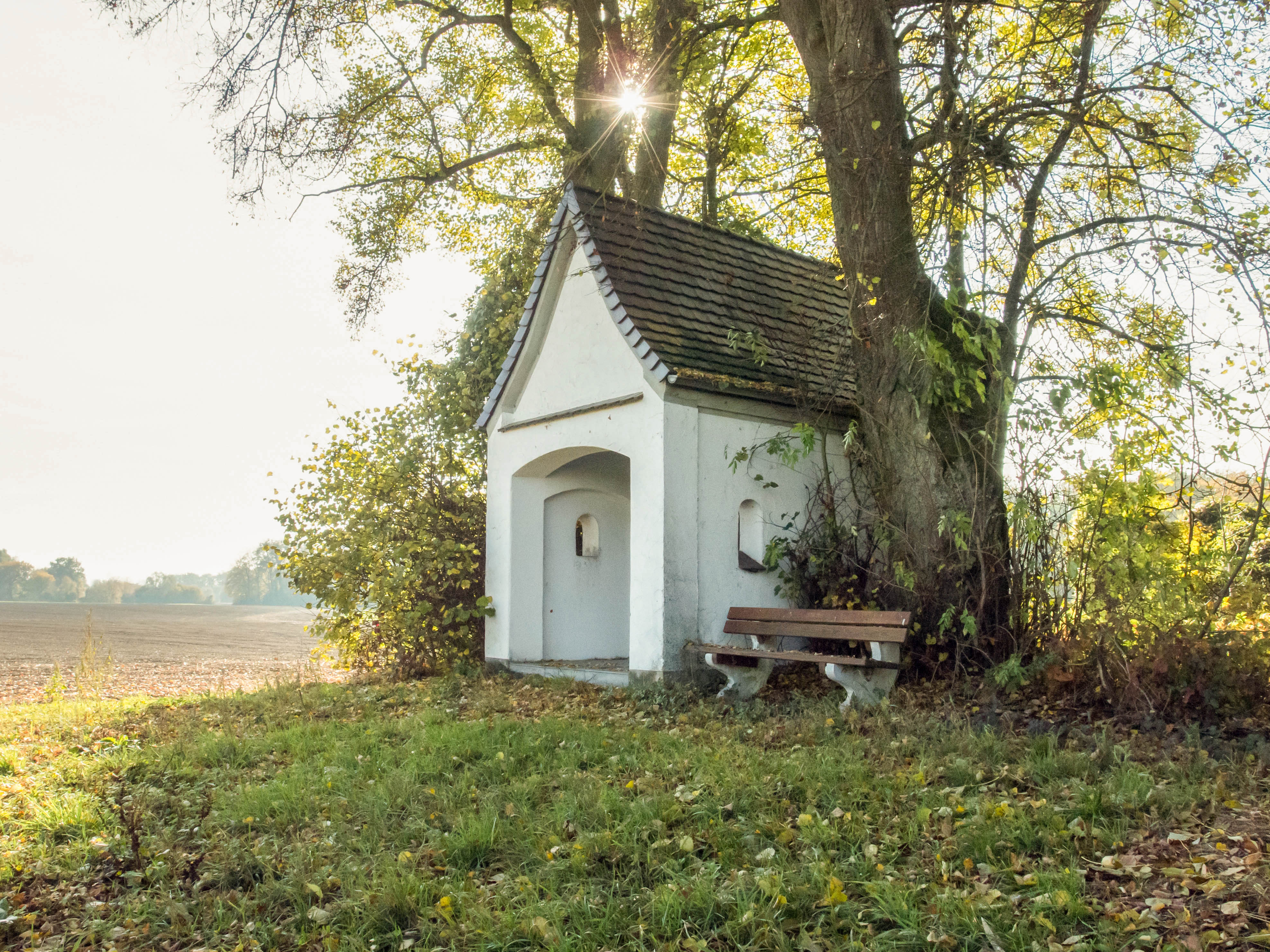 Ansicht von NE mit alten Hüterlinden, links dreigriffig, rechts viergriffig, Baudenkmal D-7-73-164-9This is a photograph of an architectural monument.